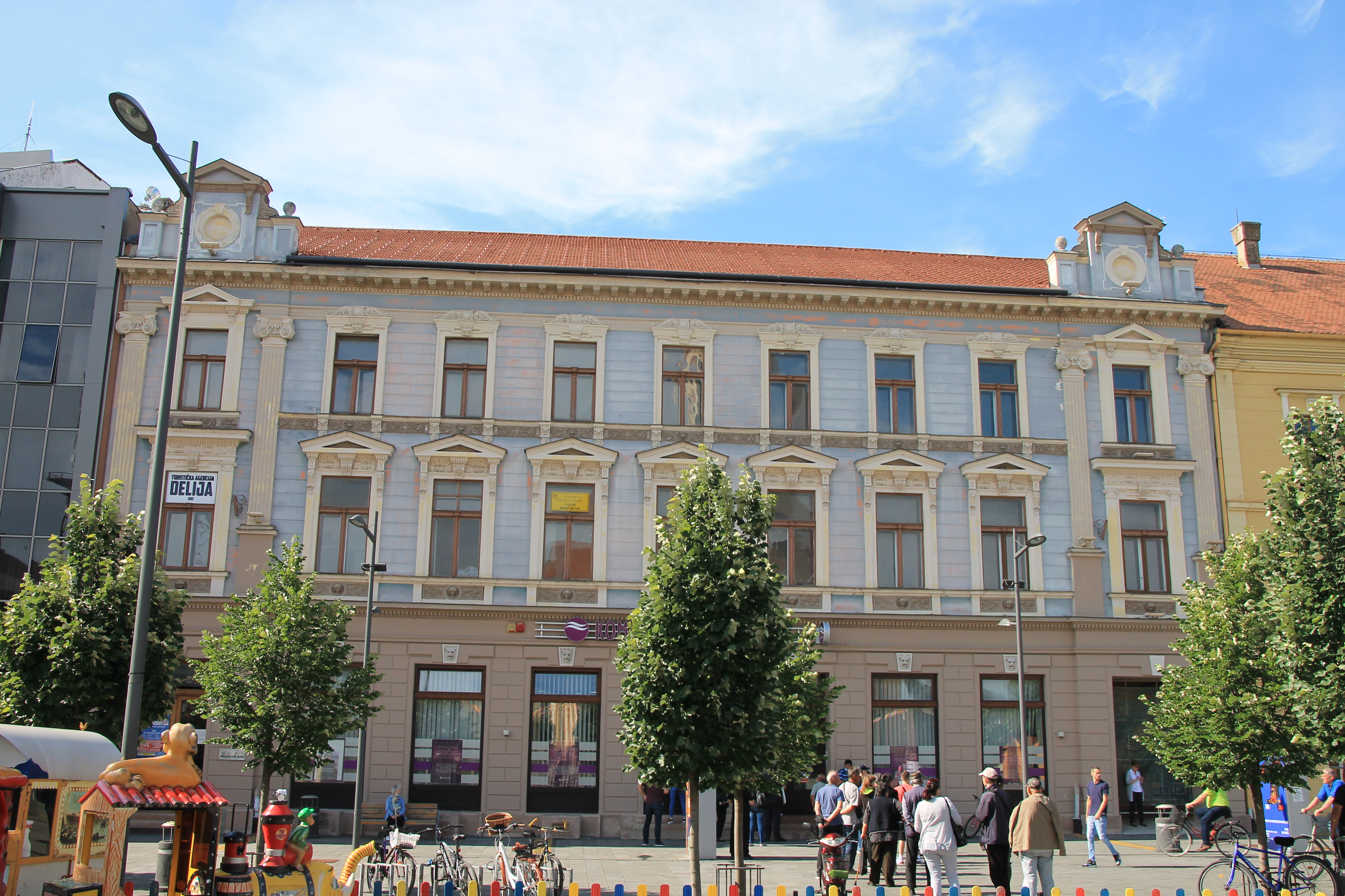 Staro jezgro Zrenjanina